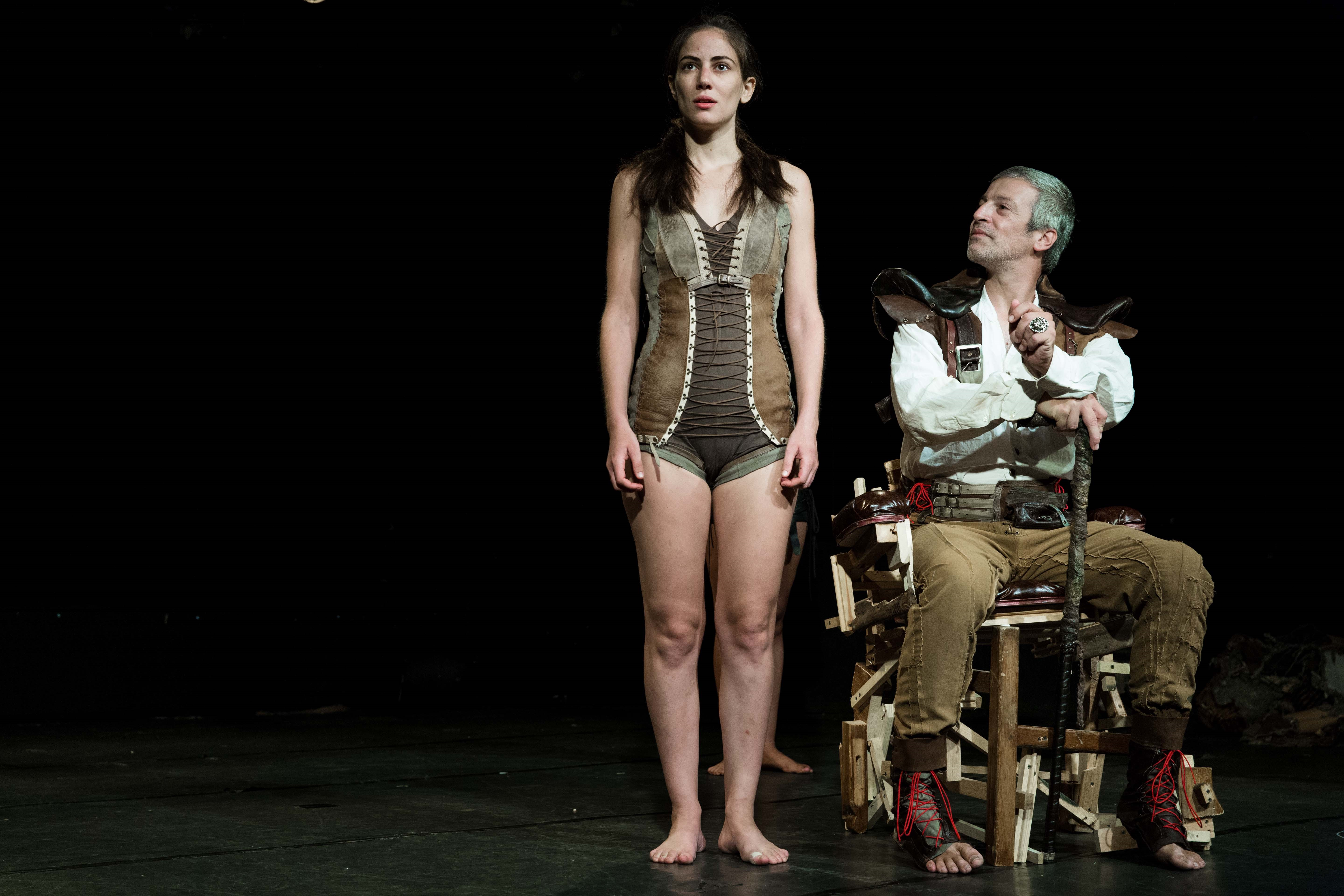 חלום על נייר זכוכית